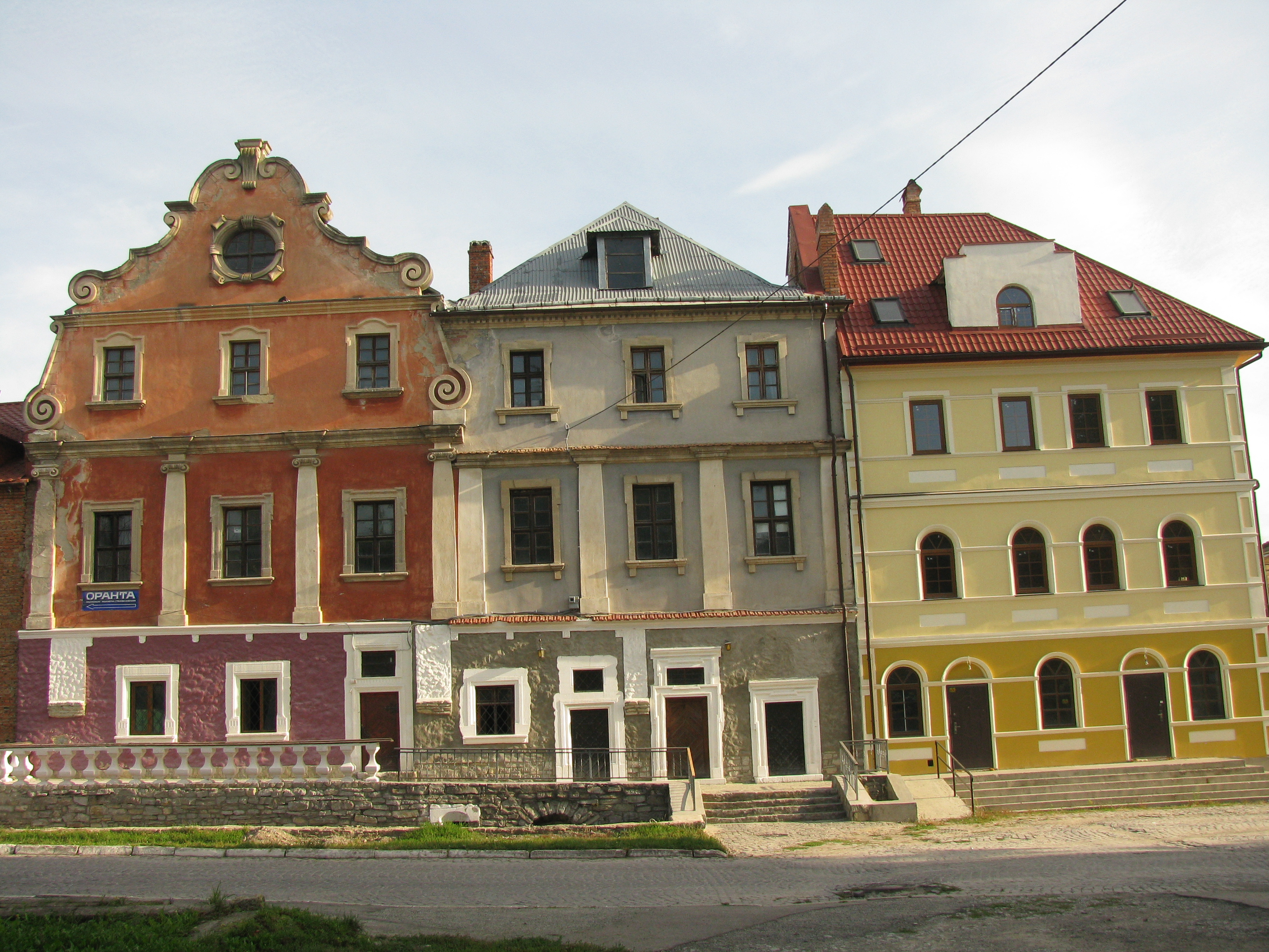 Будинок житловий (мур.), Кам'янець-Подільський, вул.Зарванська, 16